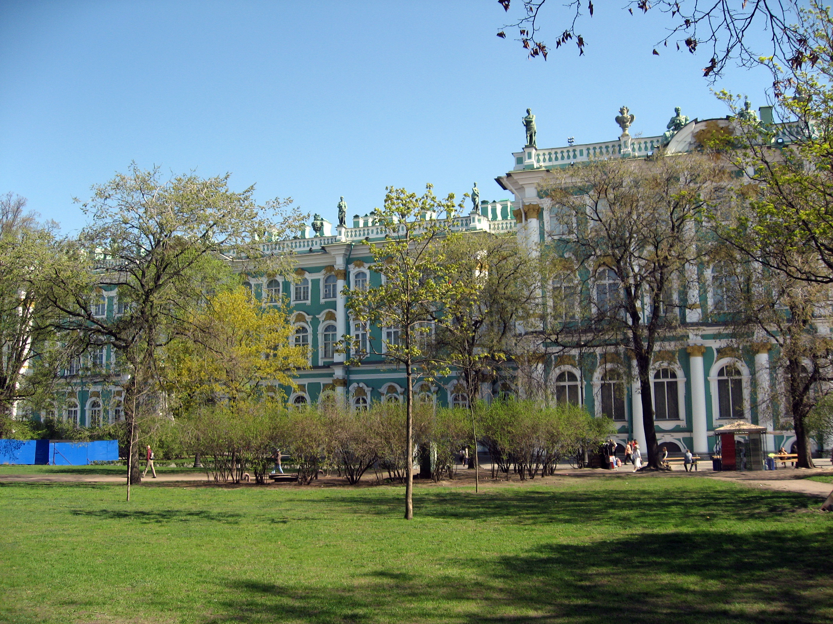 Sankt-Petěrburg